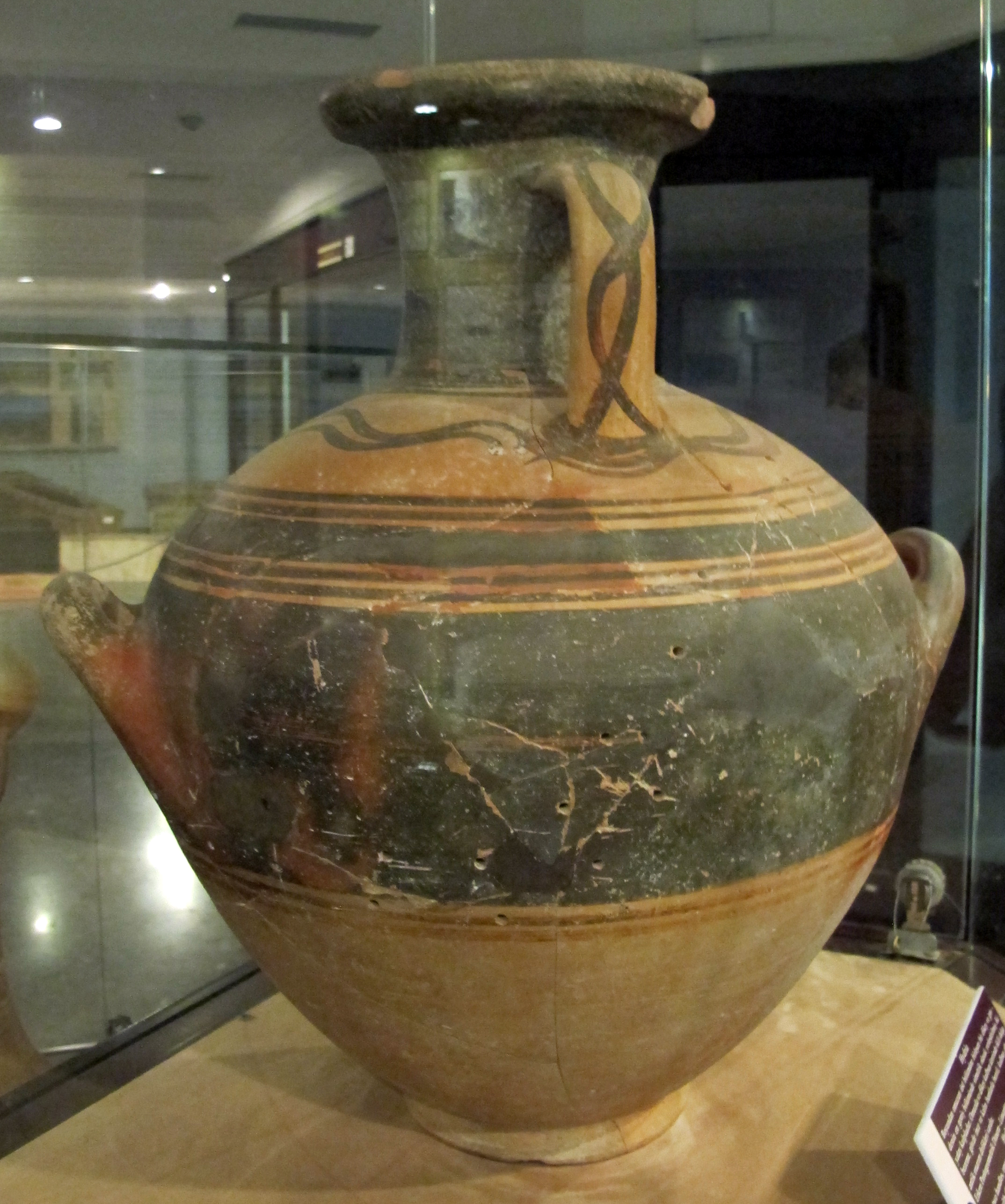 Inizio del periodo protogeometrico, hydria, da limantepe